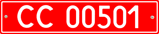 Дипломатический номерной знак автомобилей Украины (дипломаты), стандарт 1992 года